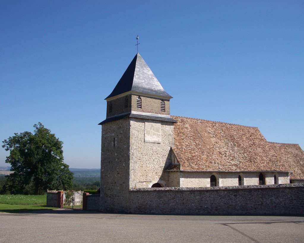 Église Saint-Ursin de Villers-sur-le-Roule (Eure).